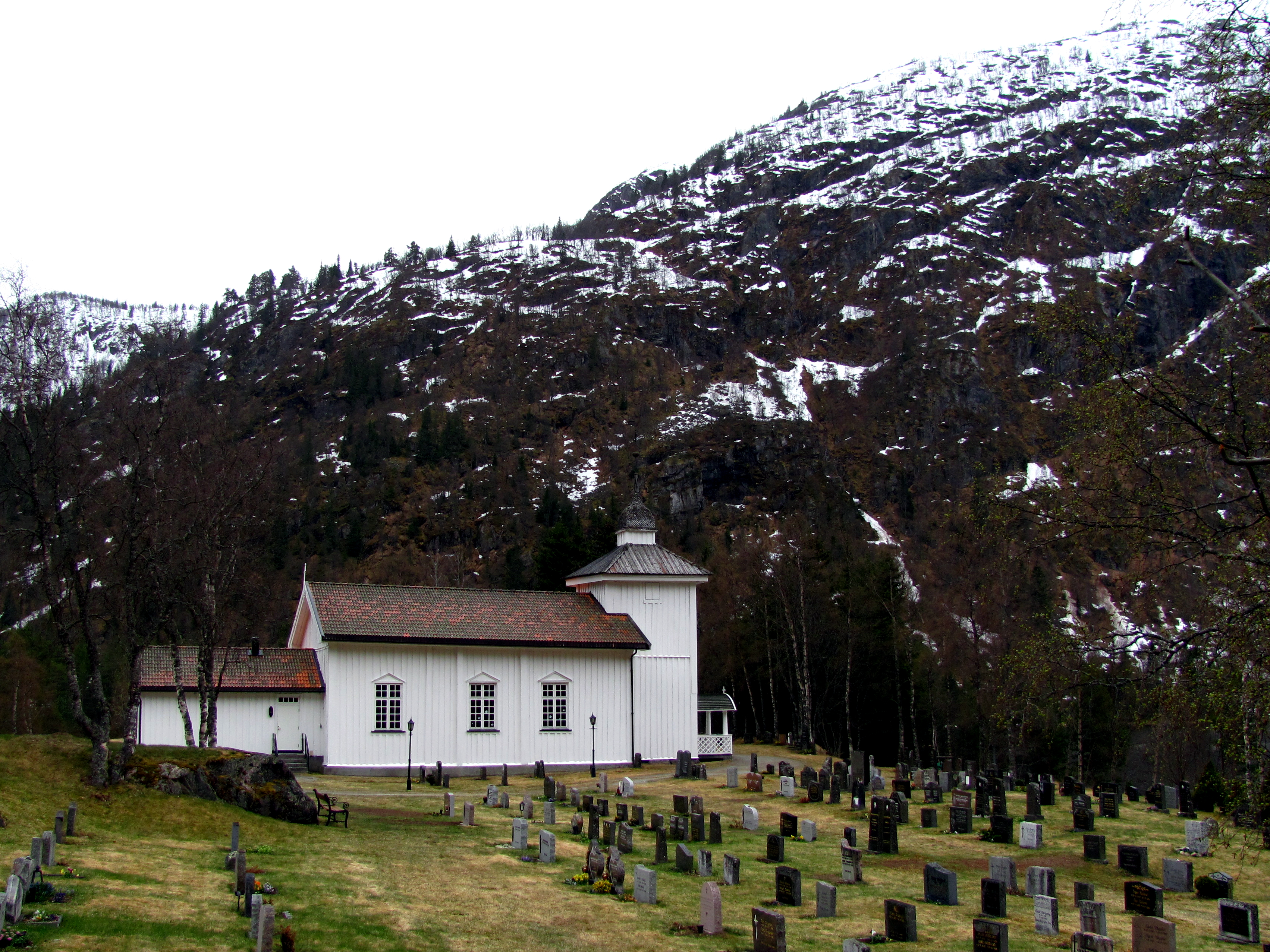 Grunge kyrkje er ei langkyrkje i tre frå 1850. Ho står i Vinje kommune i Telemark. Ho er bygd etter ei typeteikning av slottsarkitekt H.D.F. Lindstow, og tilpassa av sokneprest Anton Elias Smitt.